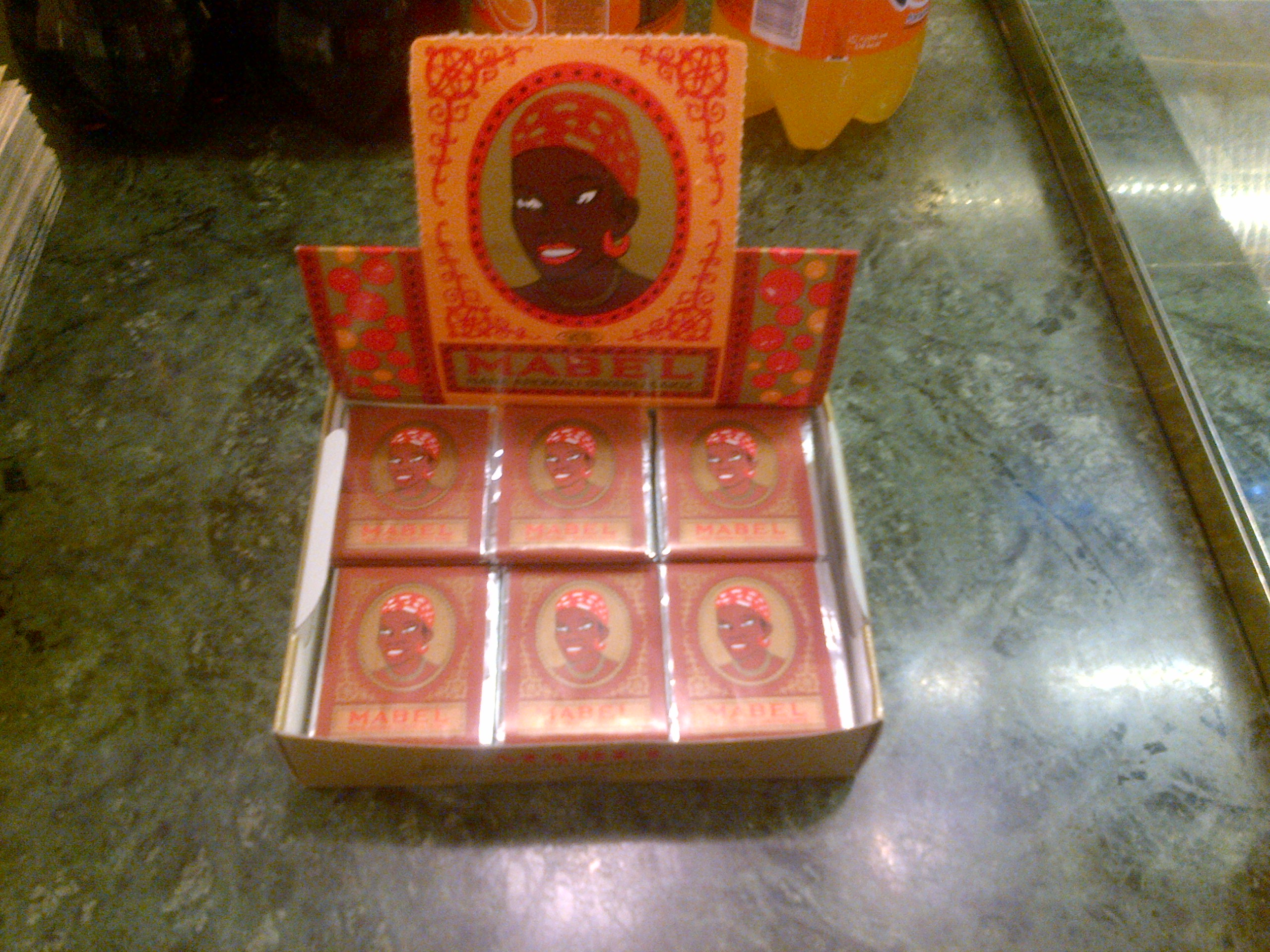 El legendario chicle turco "Mabel".